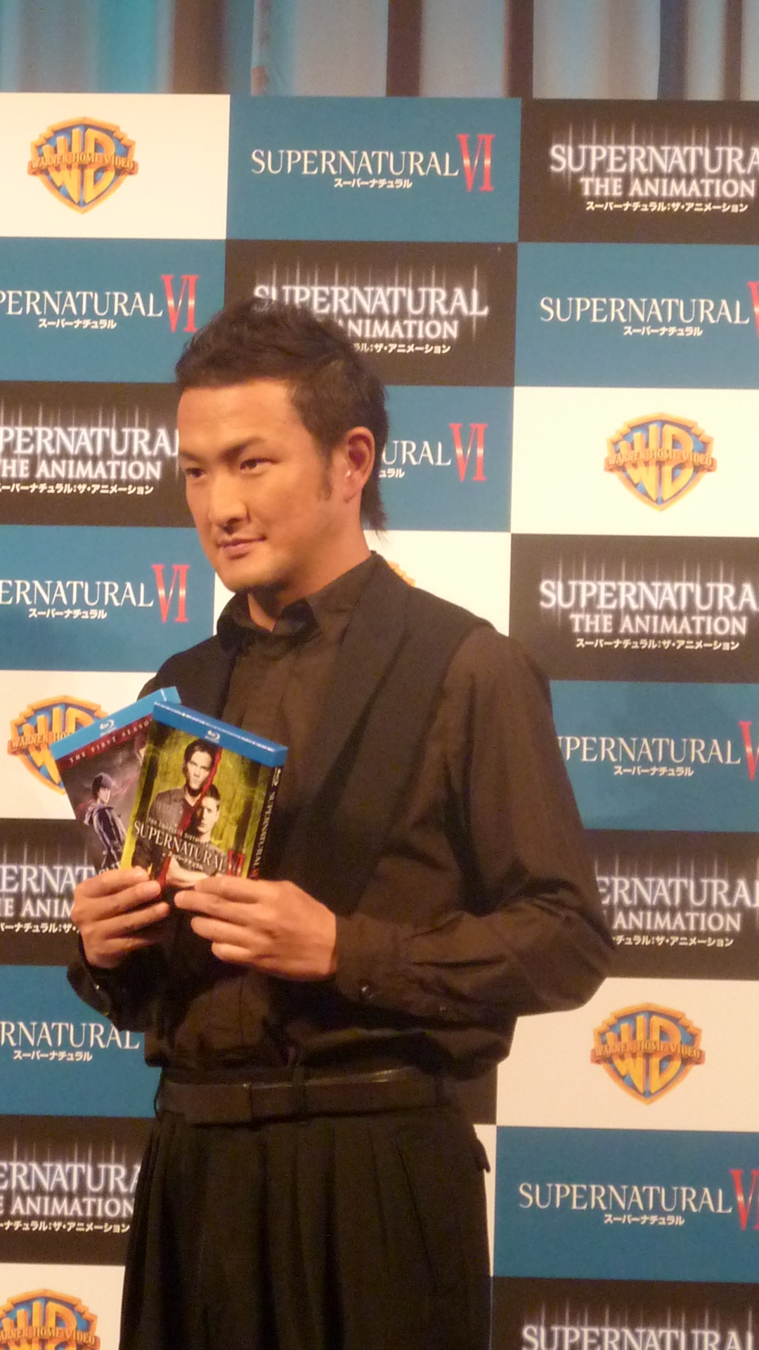 スーパーナチュラル試写会、スペースFS汐留にて